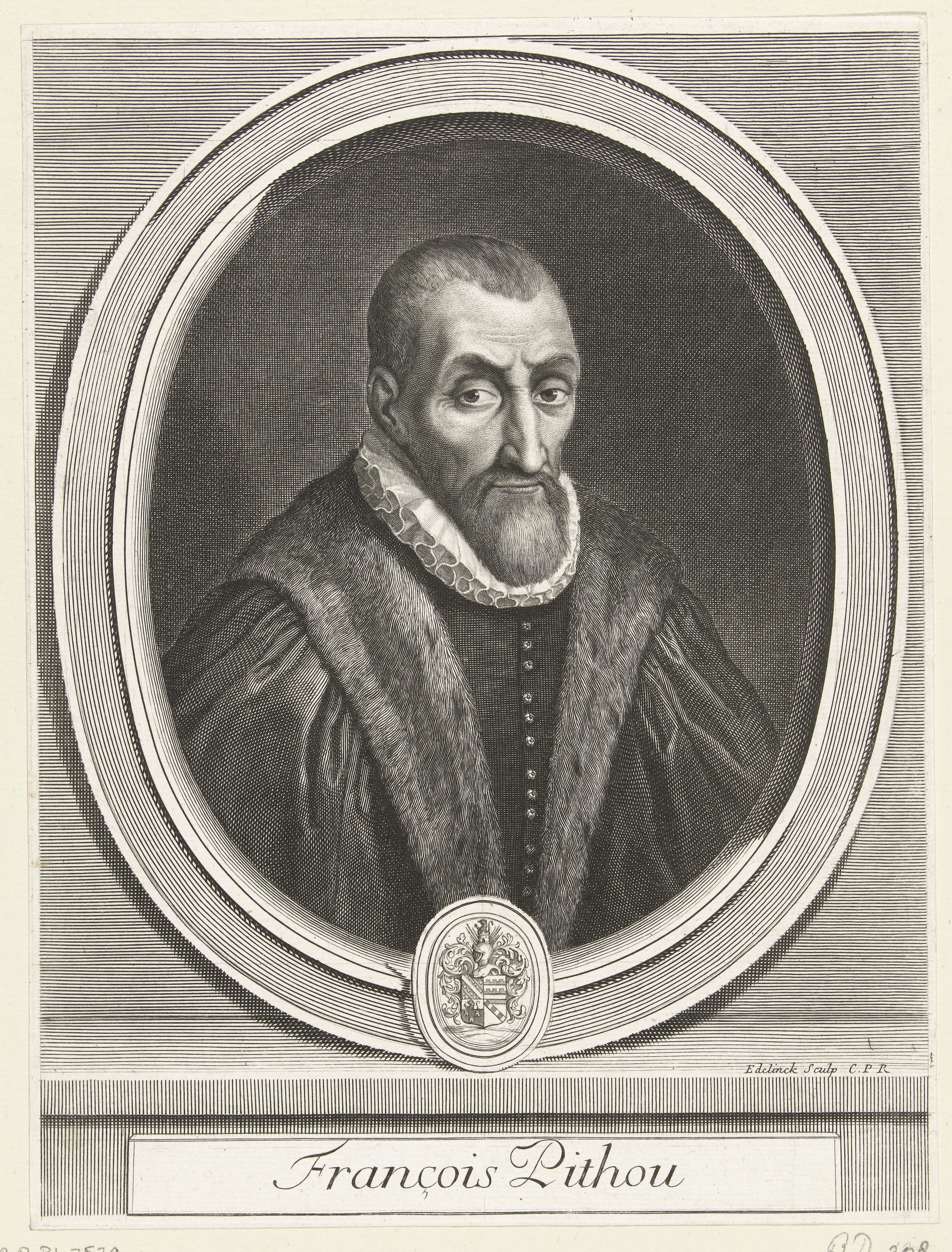 IdentificatieTitel(s): Portret van François PithouObjecttype: prent Objectnummer: RP-P-BI-7579Catalogusreferentie: Robert-Dumesnil 298Opschriften / Merken: verzamelaarsmerk, verso, gestempeld: Lugt 240Omschrijving: Portret van de Franse jurist en auteur François Pithou (1543-1621), afgebeeld in ovale omlijsting met wapen.VervaardigingVervaardiger: prentmaker: Gerard Edelinck (vermeld op object)verlener van privilege: Lodewijk XIV (koning van Frankrijk) (vermeld op object)Plaats vervaardiging: prentmaker: Parijsverlener van privilege: FrankrijkDatering: 1666 - 1707Fysieke kenmerken: gravureMateriaal: papier Techniek: graveren (drukprocedé)OnderwerpWie: François PithouVerwerving en rechtenVerwerving: overdracht van beheer 1816Copyright: Publiek domein